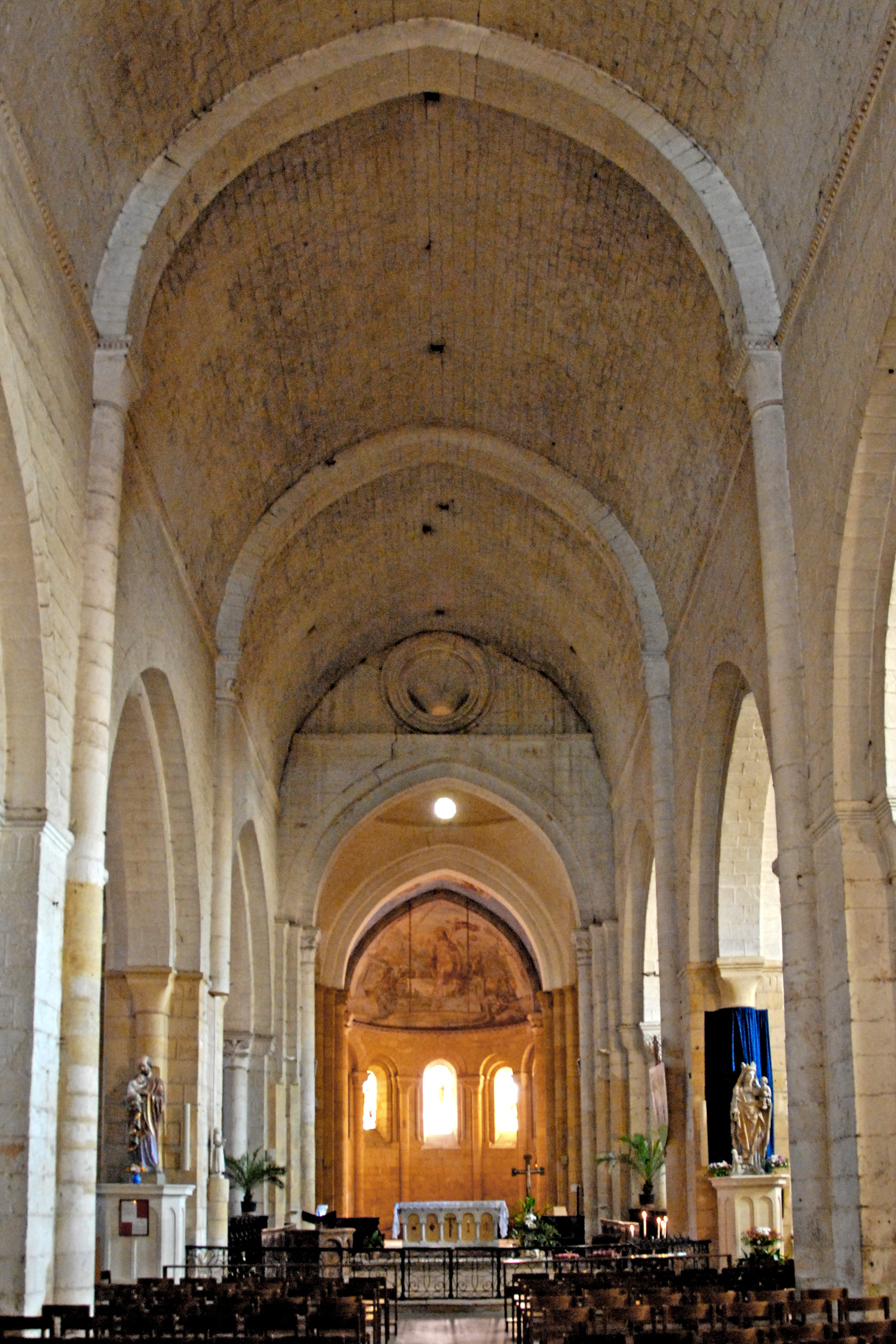 Cadouin, Mittelschiff zum Chor